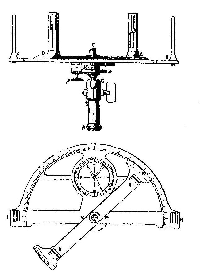 Vues de profil et de dessus d'un graphomètre à pinnules